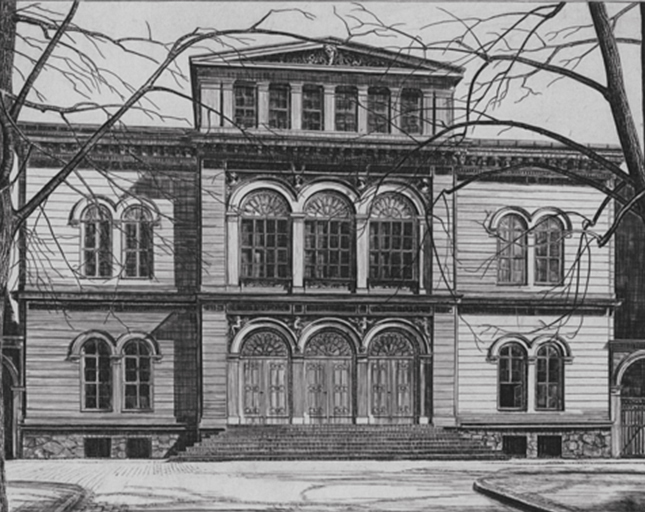 Theater Frankfurt-Oder (Schinkel-Flaminius) Emil Flaminius (1807–1893) Alternative names Emil Karl Alexander FlaminiusDescriptionGerman architectDate of birth/death 1807 7 October 1893Location of birth/death Kostrzyn nad Odrą BerlinAuthority control : Q109349 creator QS:P170,Q109349